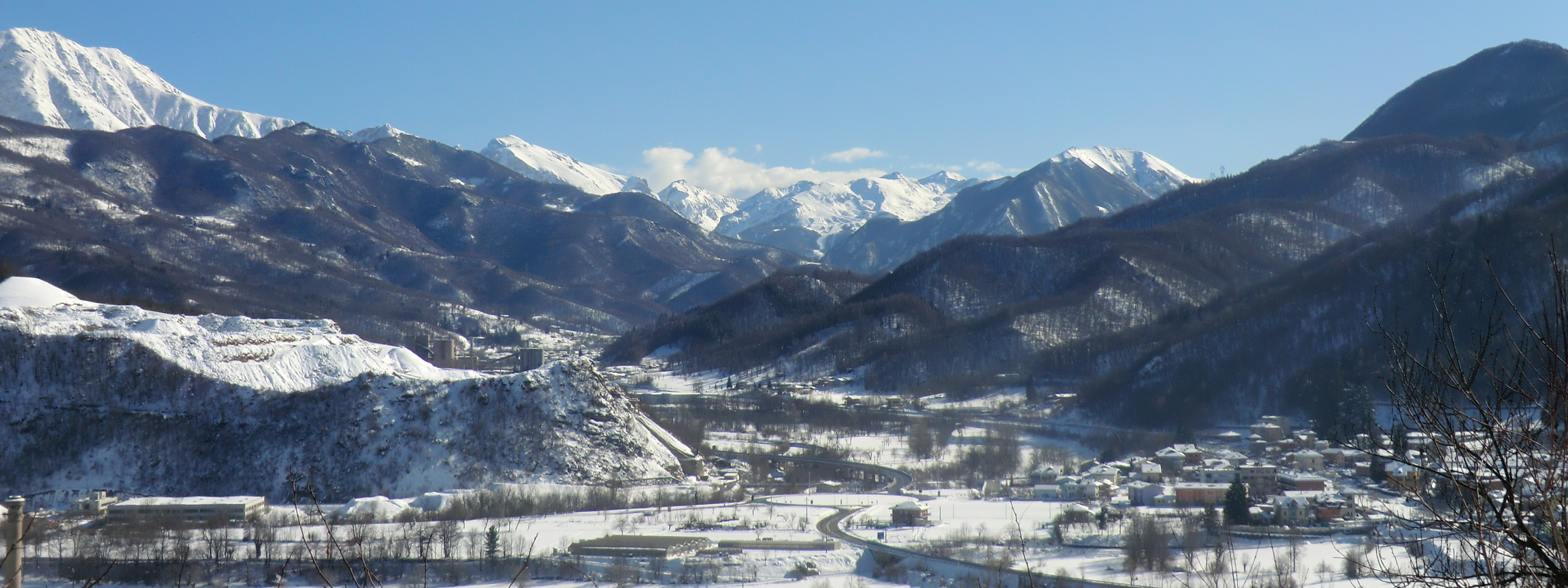 Valle Vermenagna: panorama della valle tra Roccavione e Robilante